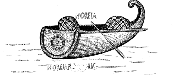 Horeia Gauckler